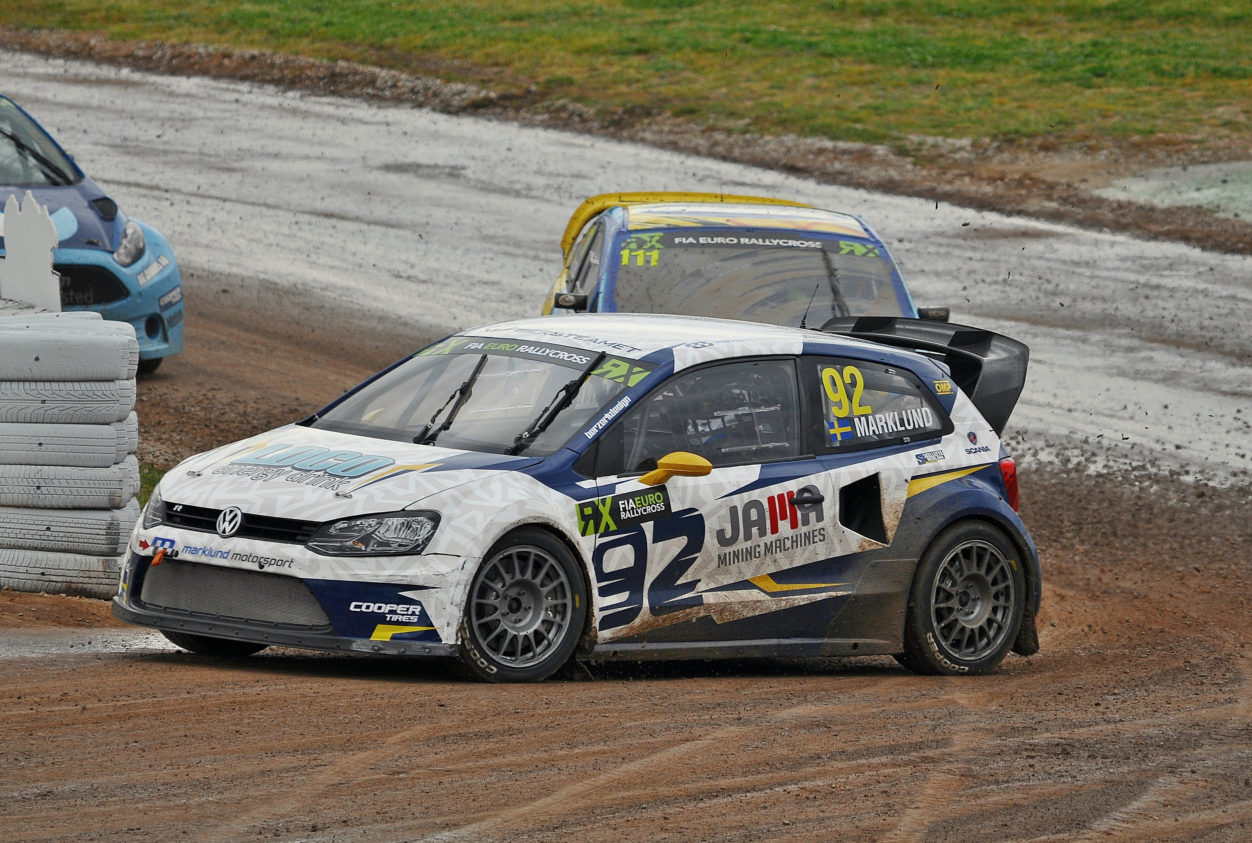 RX Barcelona